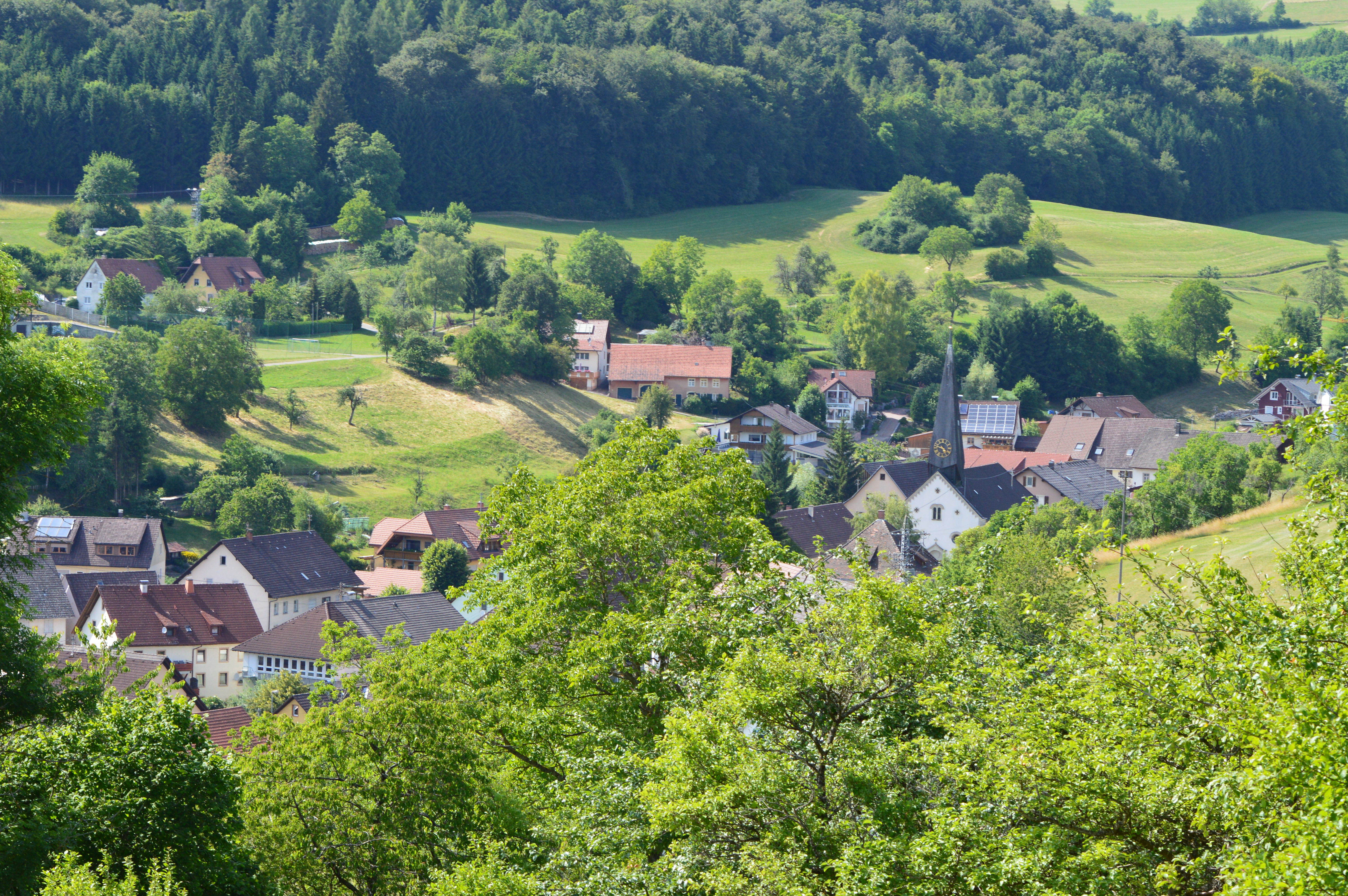 D Dorfmitti vo Muuchè vom Rank a dè Stüèlinger Schtrooss uus gsää.